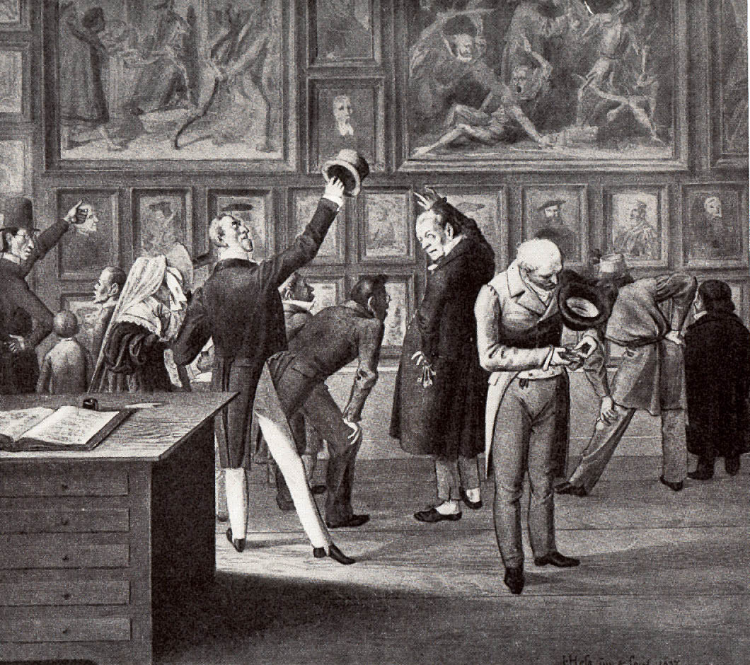 Pedell Scholer erklärt den Besuchern Werke der öffentlichen Basler Kunstsammlern im Vorsaal des Hauses zur Mücke